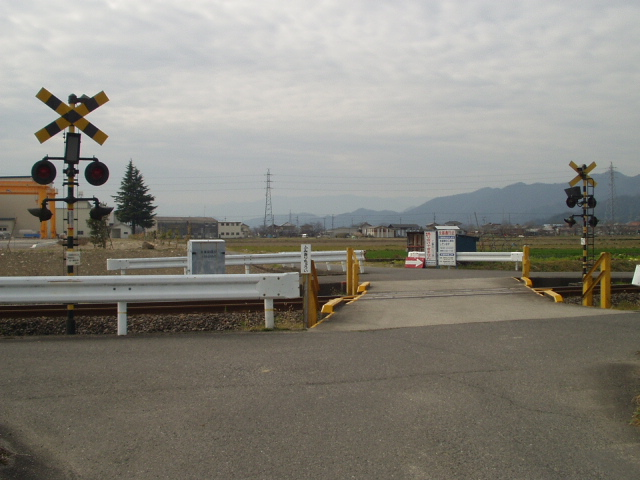 樽見鉄道樽見線の糸貫～本巣間にある本巣南踏切 数少ない第3種踏切の一つ